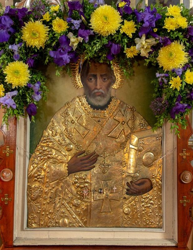 Ікона